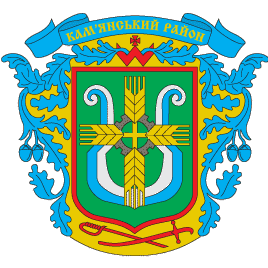 Герб Кам'янського району